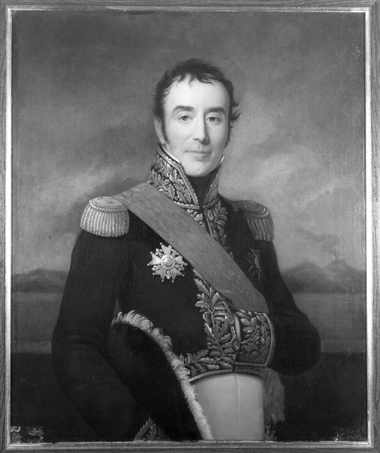 Portrait du Général Jean David Martin de Campredon (1761-1837) par le peintre suisse Im Thurm Alexander Emil (1829-1889). Huile sur toile, 86 x 72 cm. (1856)